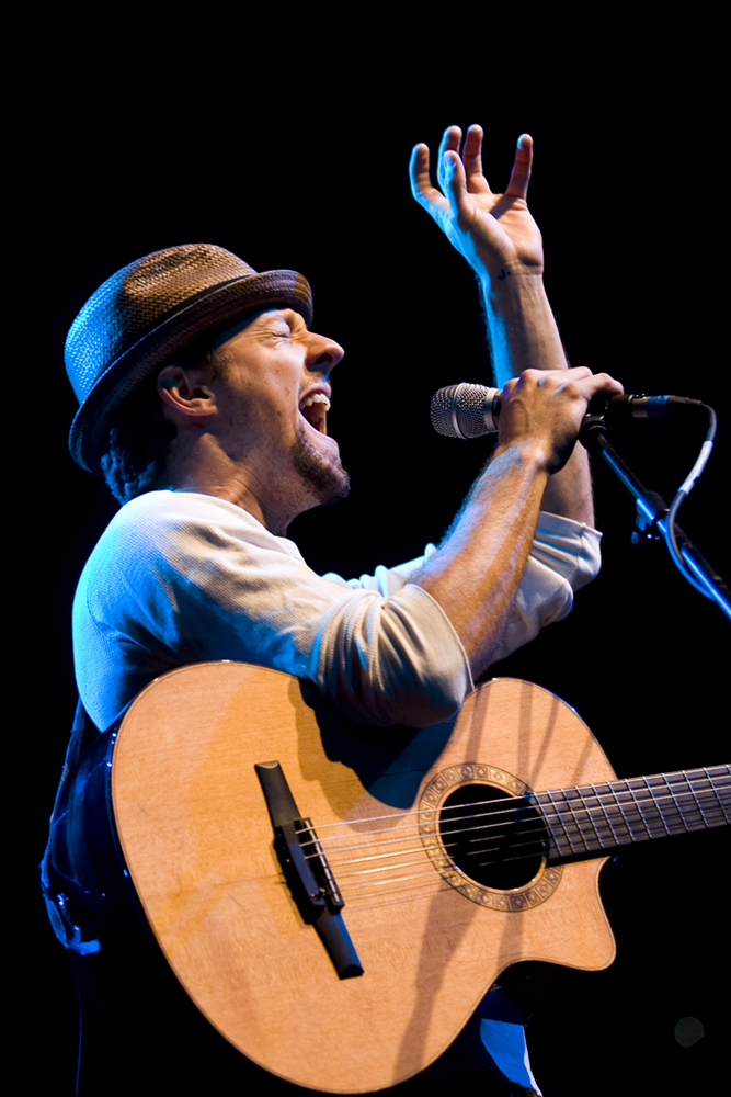 Jason Mraz at Campo Pequeno, March 19, 2009